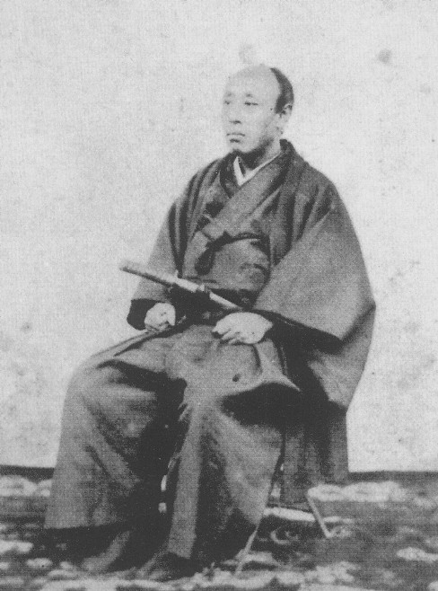 板倉勝静 Itakura Katukiyo. 名刺判写真。